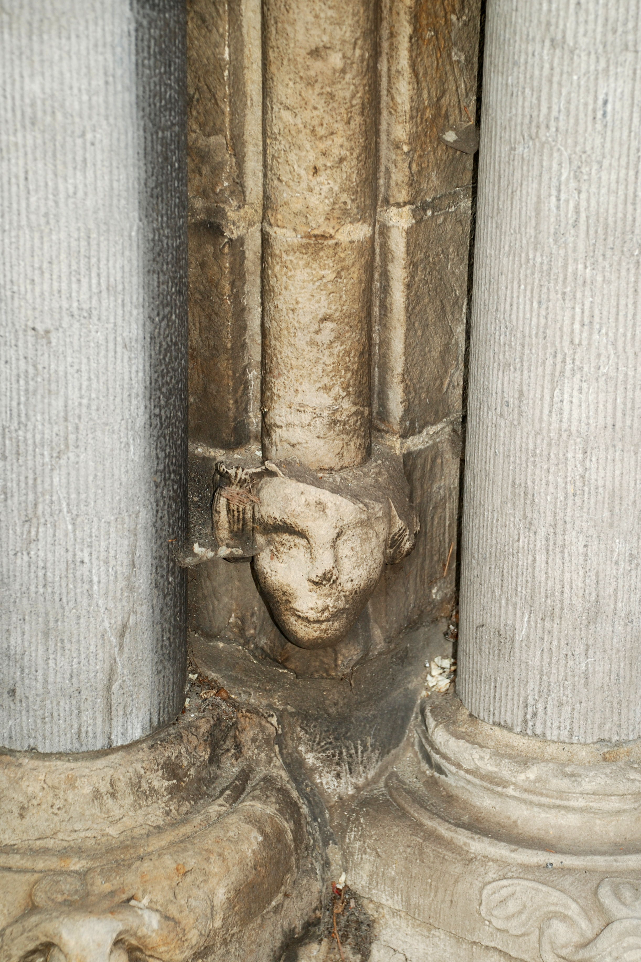 Belgique - Louvain - Chapelle de la Porte Romane